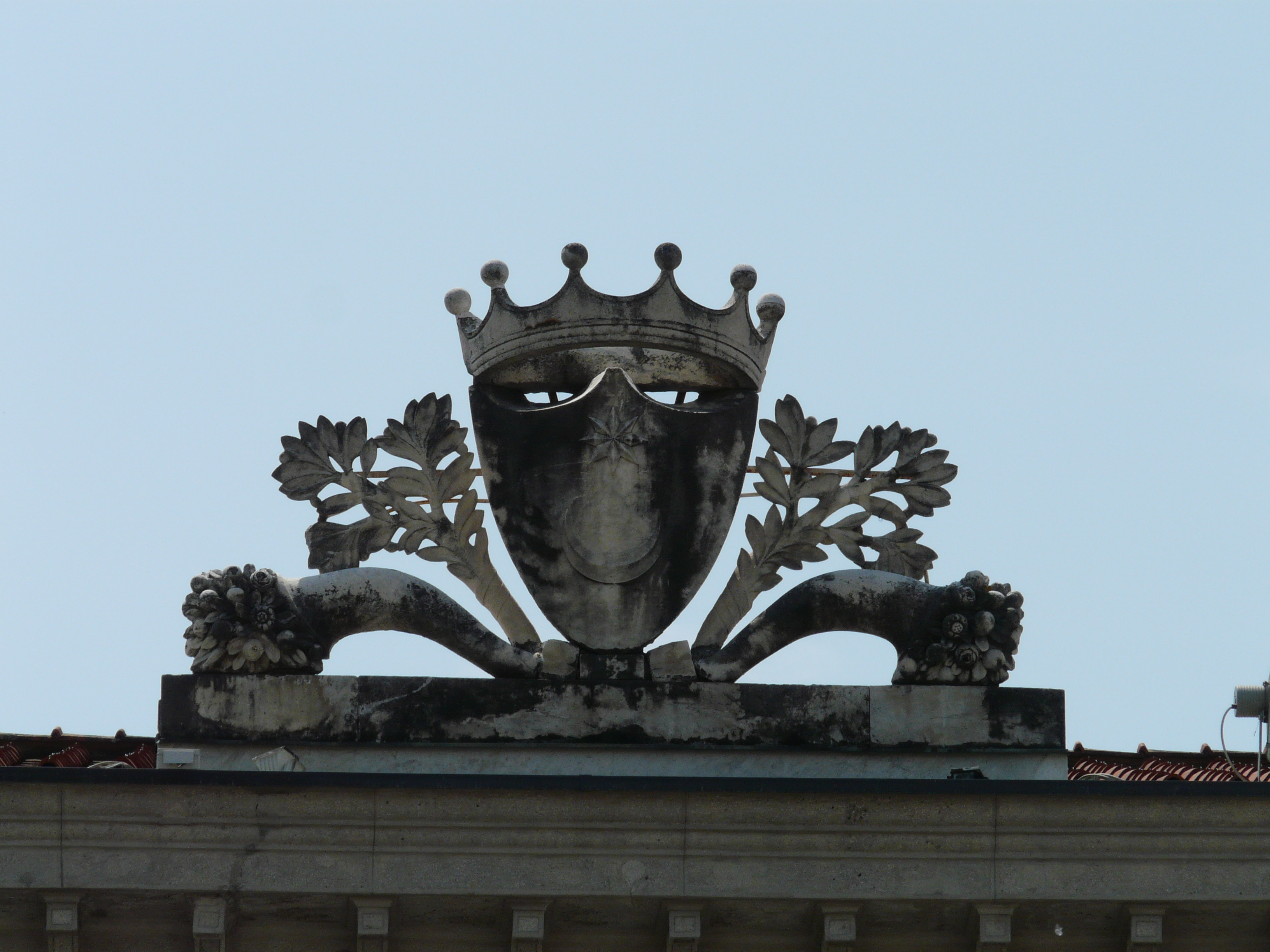 Municipio di Sarzana, Liguria, Italia